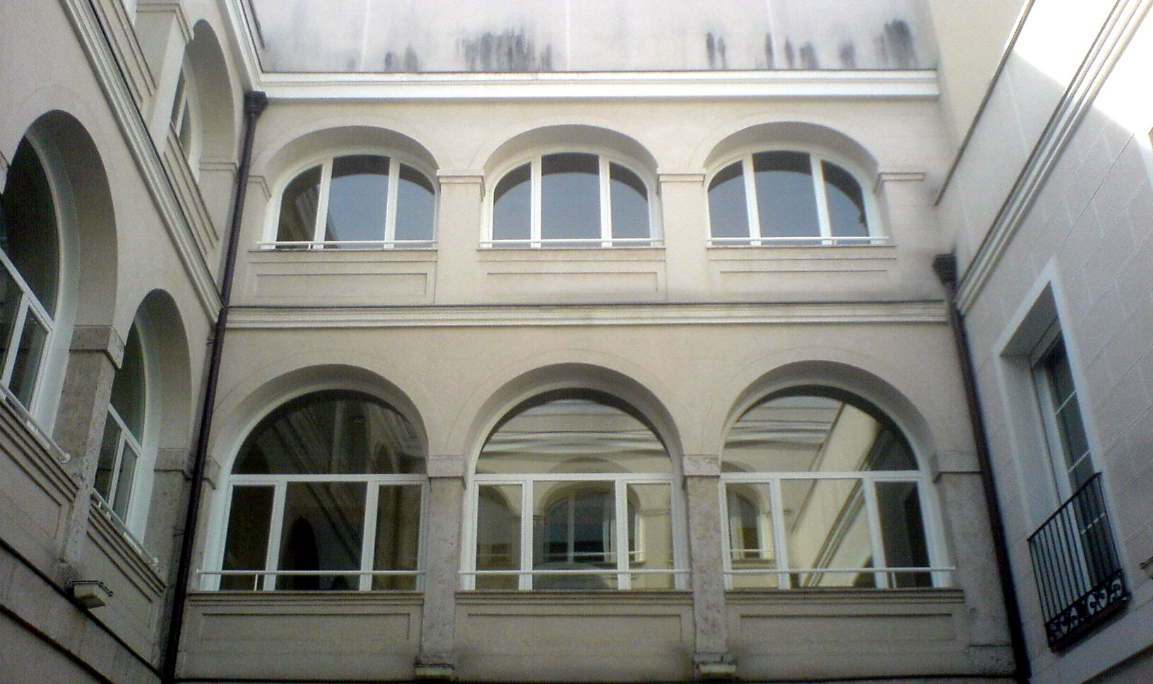 Detalle del patio del Palacio de los Villagómez de Valladolid. Se puede apreciar que el lado norte está completamente cubierto, algo característico de los palacios de Valladolid.